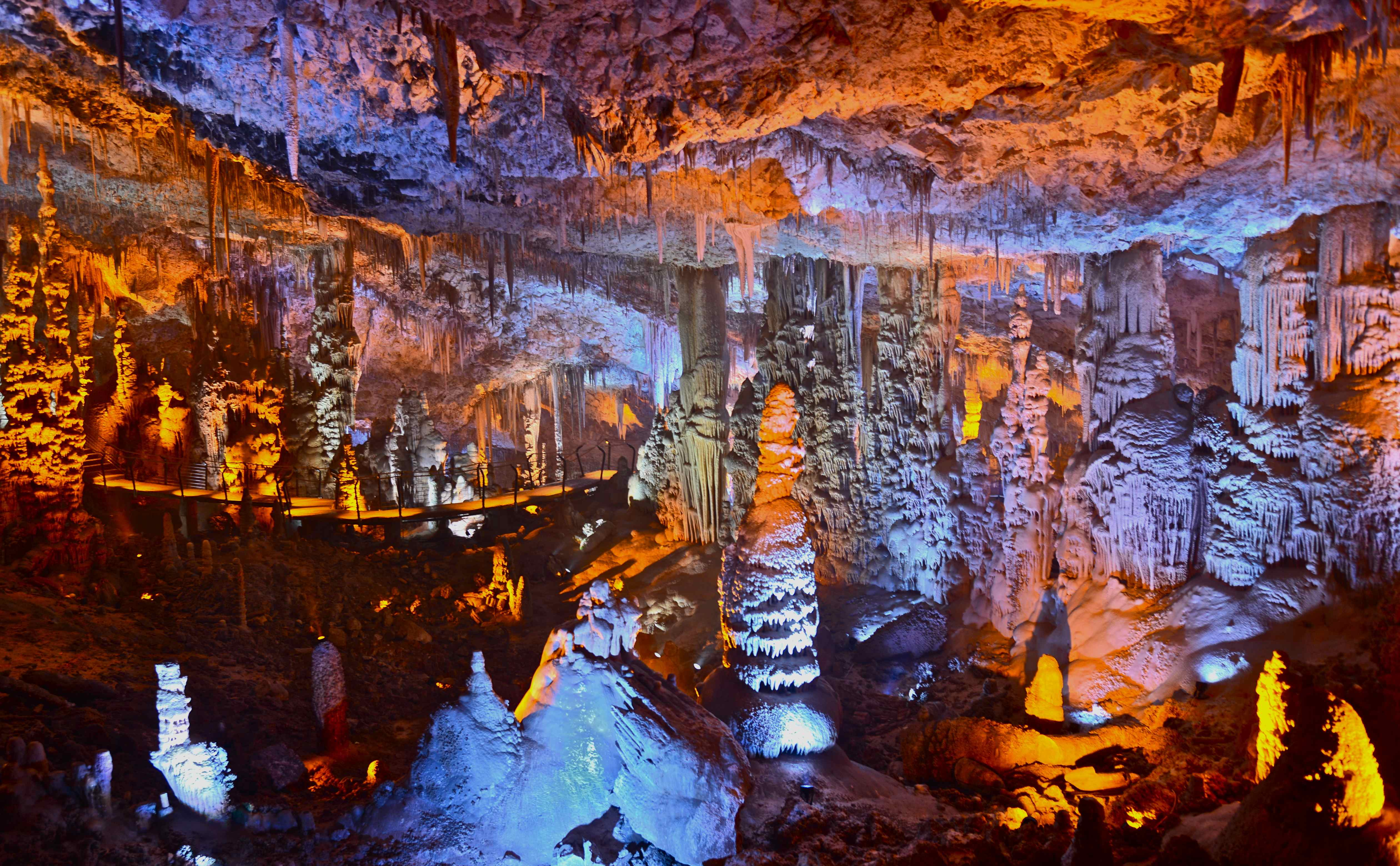 מערת אבשלום, הידועה גם בשם מערת הנטיפים או מערת שורק, היא מערת נטיפים הנמצאת בהרי יהודה, כשלושה קילומטרים ממזרח לעיר בית שמש. שמה של המערה נקבע לזכרו של החייל אבשלום שוהם שנפצע אנושות במלחמת ההתשה ונפטר מפציעתו לאחר 3 שנים. אבשלום שוהם נקרא על שם אבשלום פיינברג, אחיה של צילה סבתו, והמשפחה אף תרמה לשיקום המערה וקריאתה על שמו.